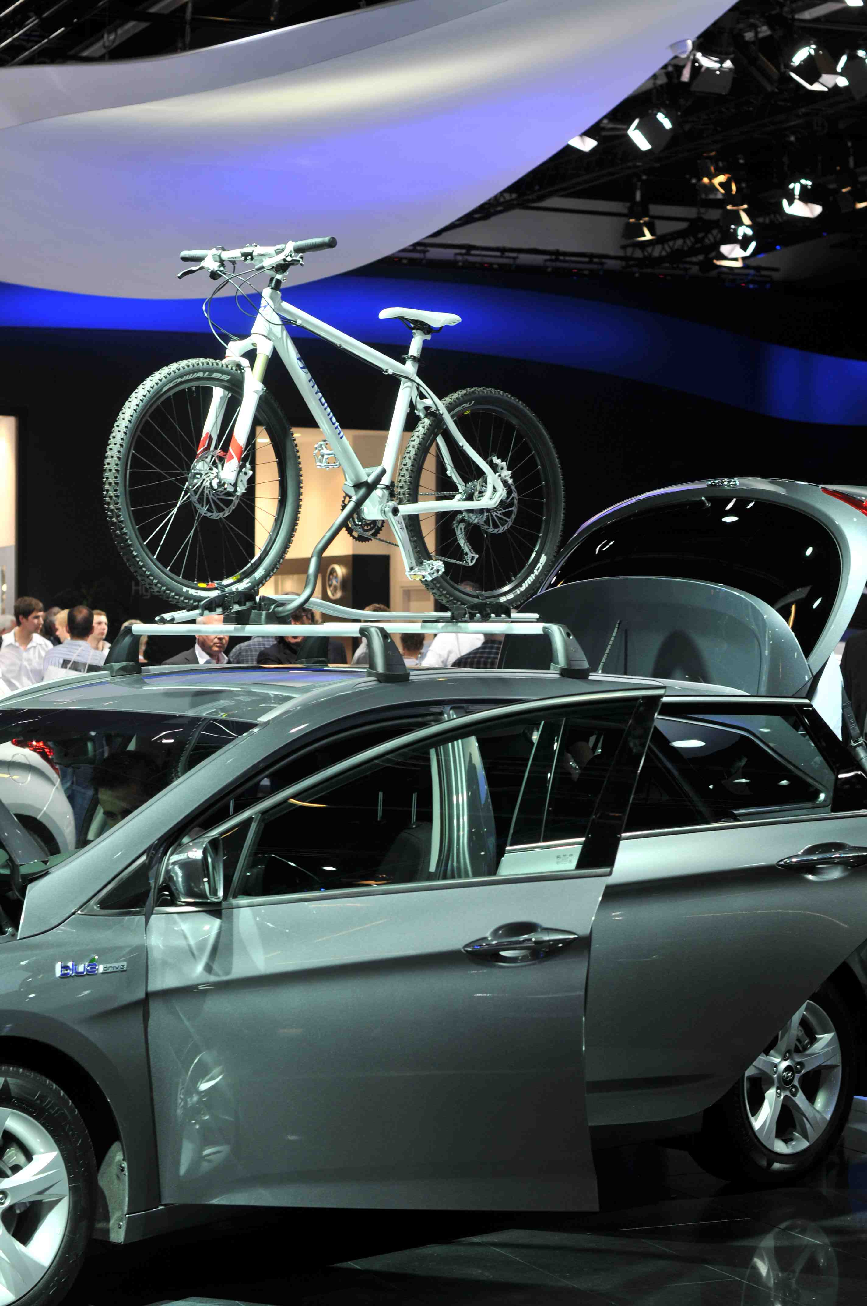 IAA 2011 - Internationale Automobilausstellung in Frankfurt/Main.